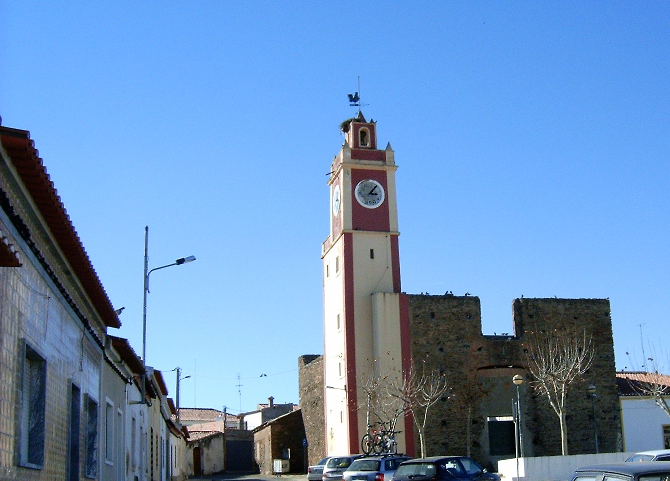 Torre do Relógio e Castelo da Amareleja